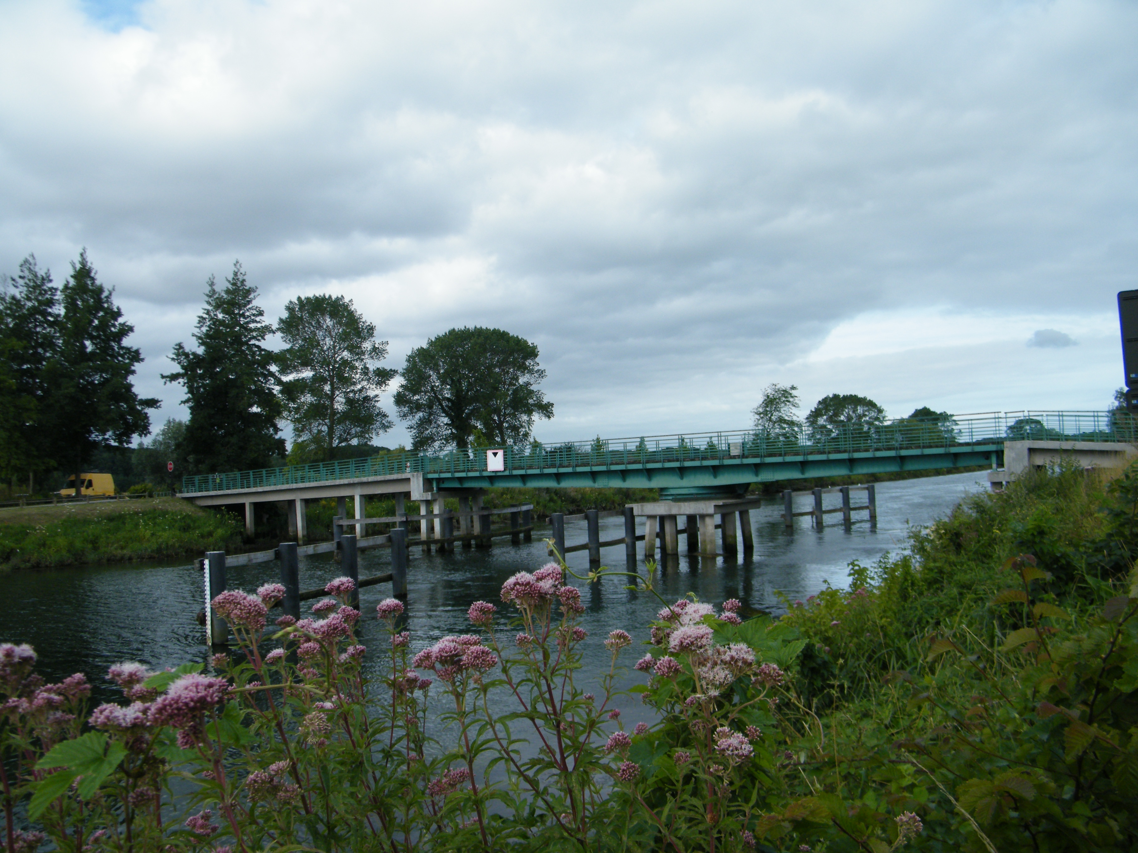 Pont tournant sur le canal de la Somme à Saigneville, Petit-Port, ((Somme) France)).